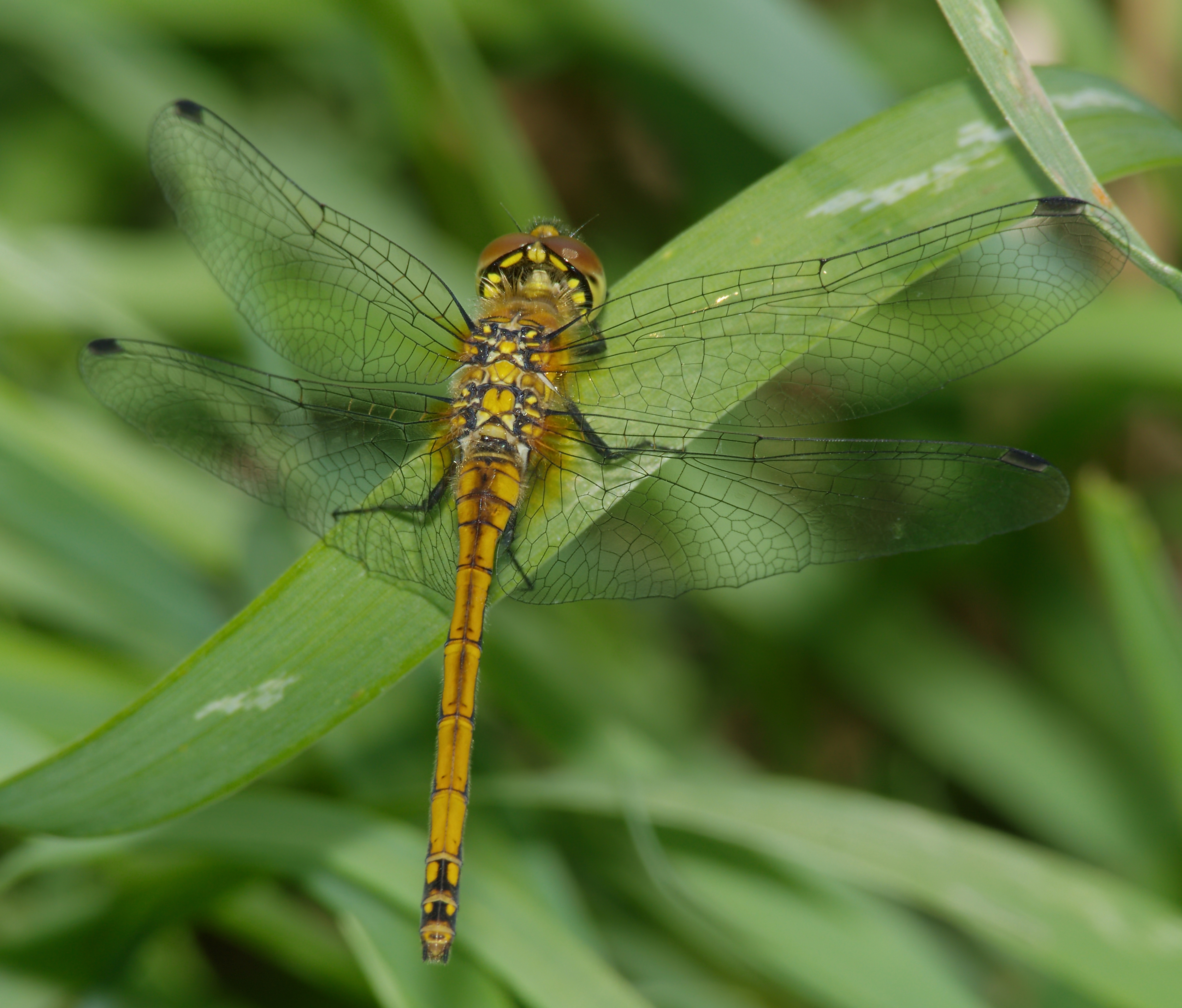 Schwarze Heidelibelle - Sympetrum danae, Weibchen. Aufgenommen an der Mulde in Eilenburg, Sachsen, Deutschland.